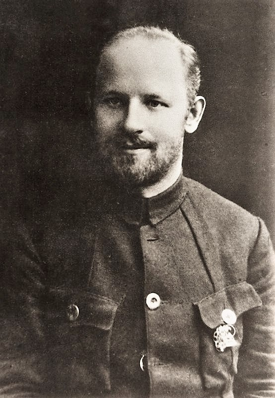 Вацлаў Ластоўскі